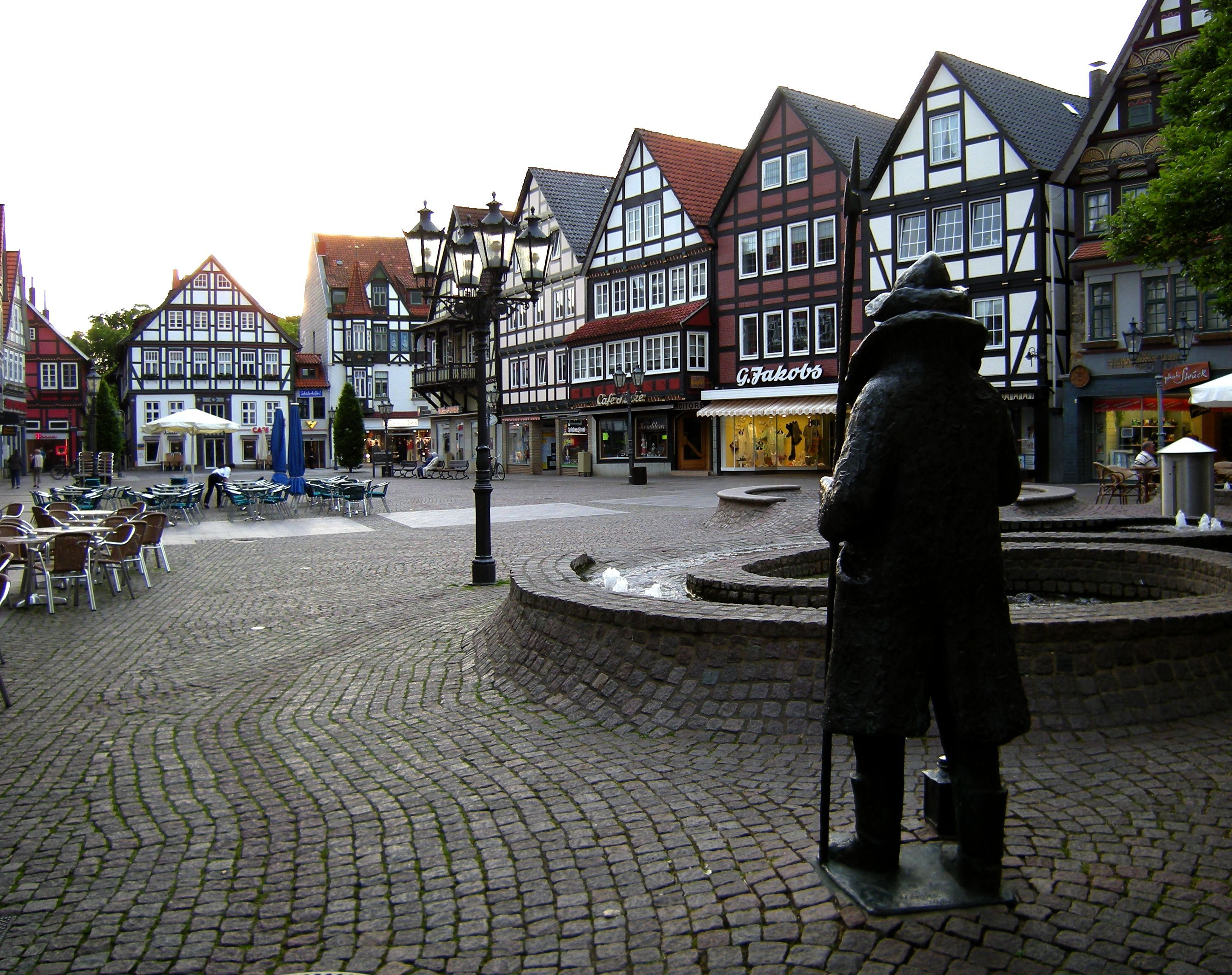 Rinteln-Marktplatz.jpg